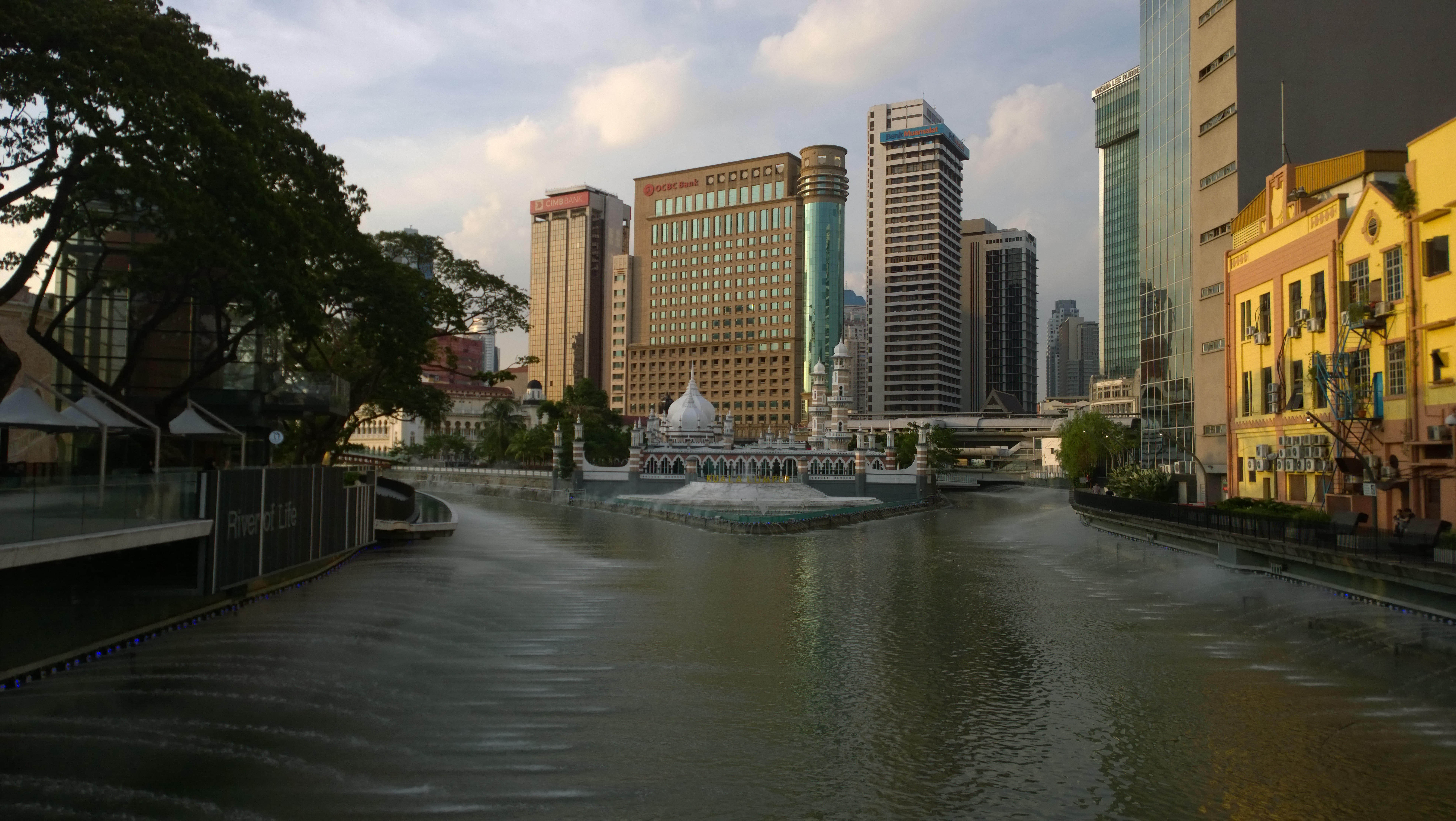 Titik pertemuan antara Sungai Klang dan Sungai Gombak